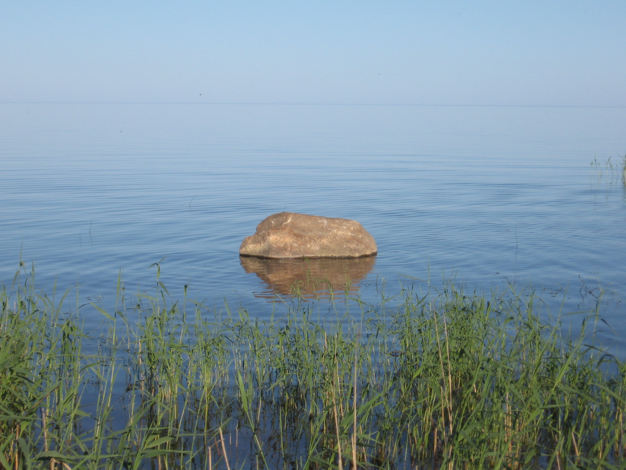 Lake Peipus